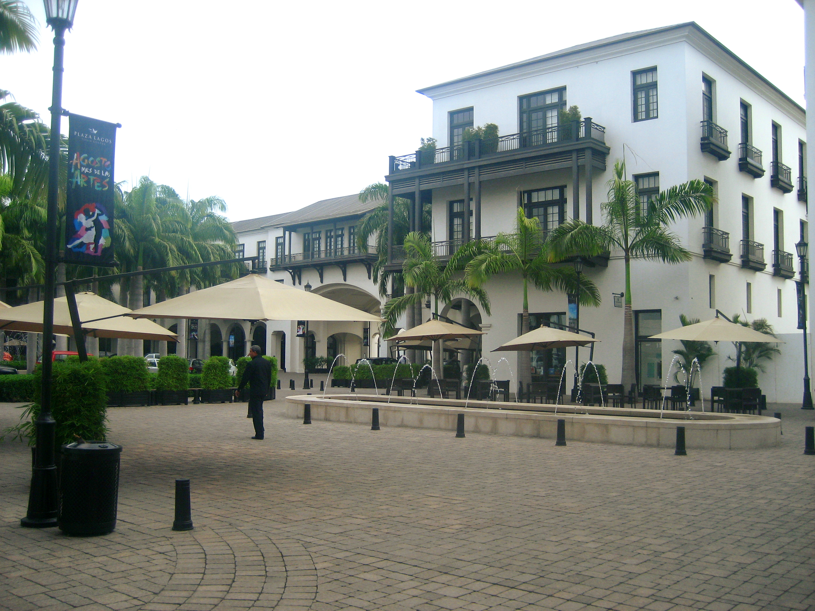 Foto del centro comercial Plaza Lagos Town Center